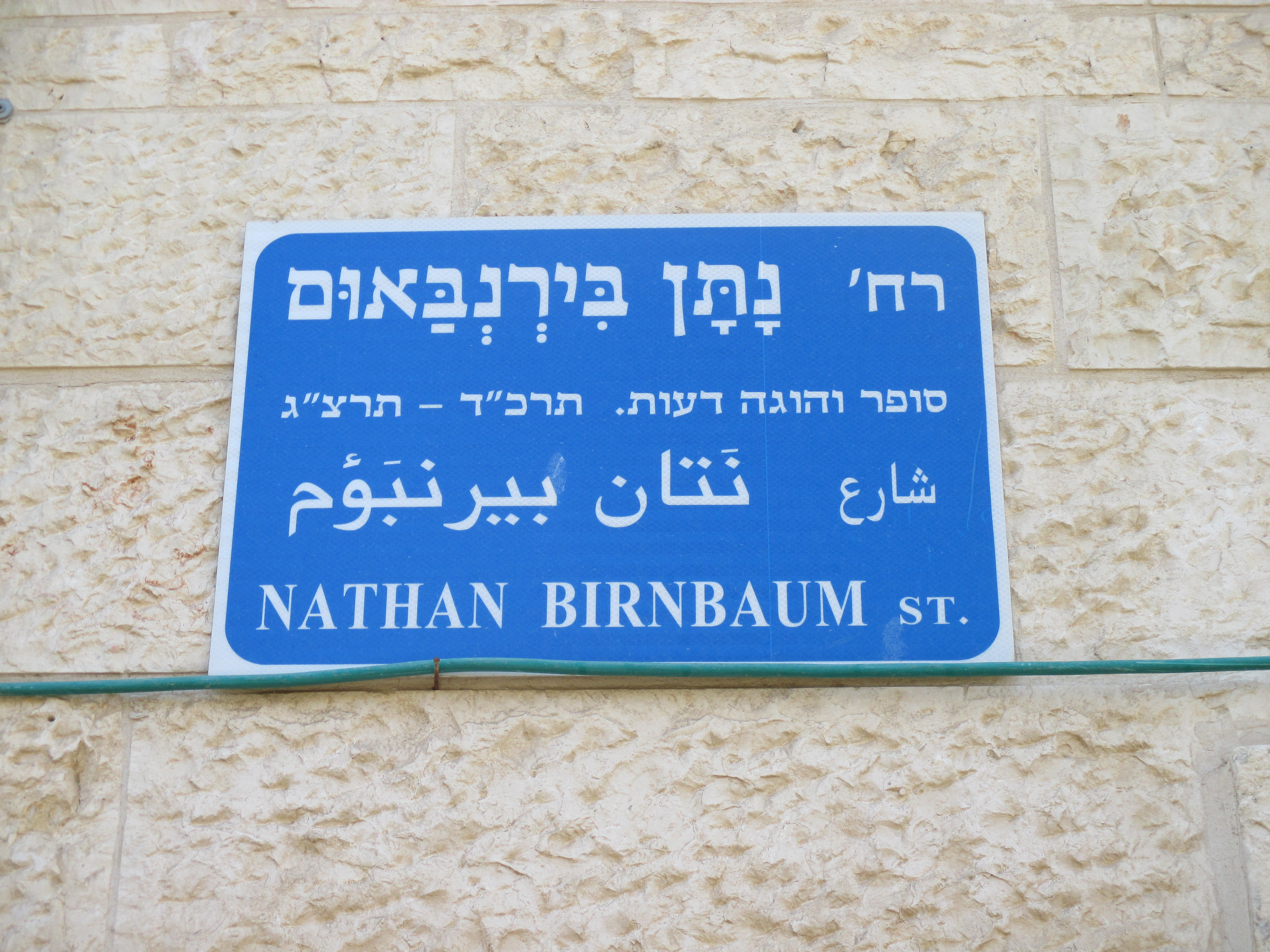 רחוב בירנבוים בירושלים